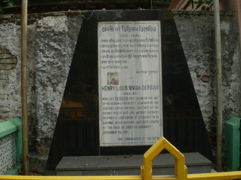 Derogio tomb at kolkata